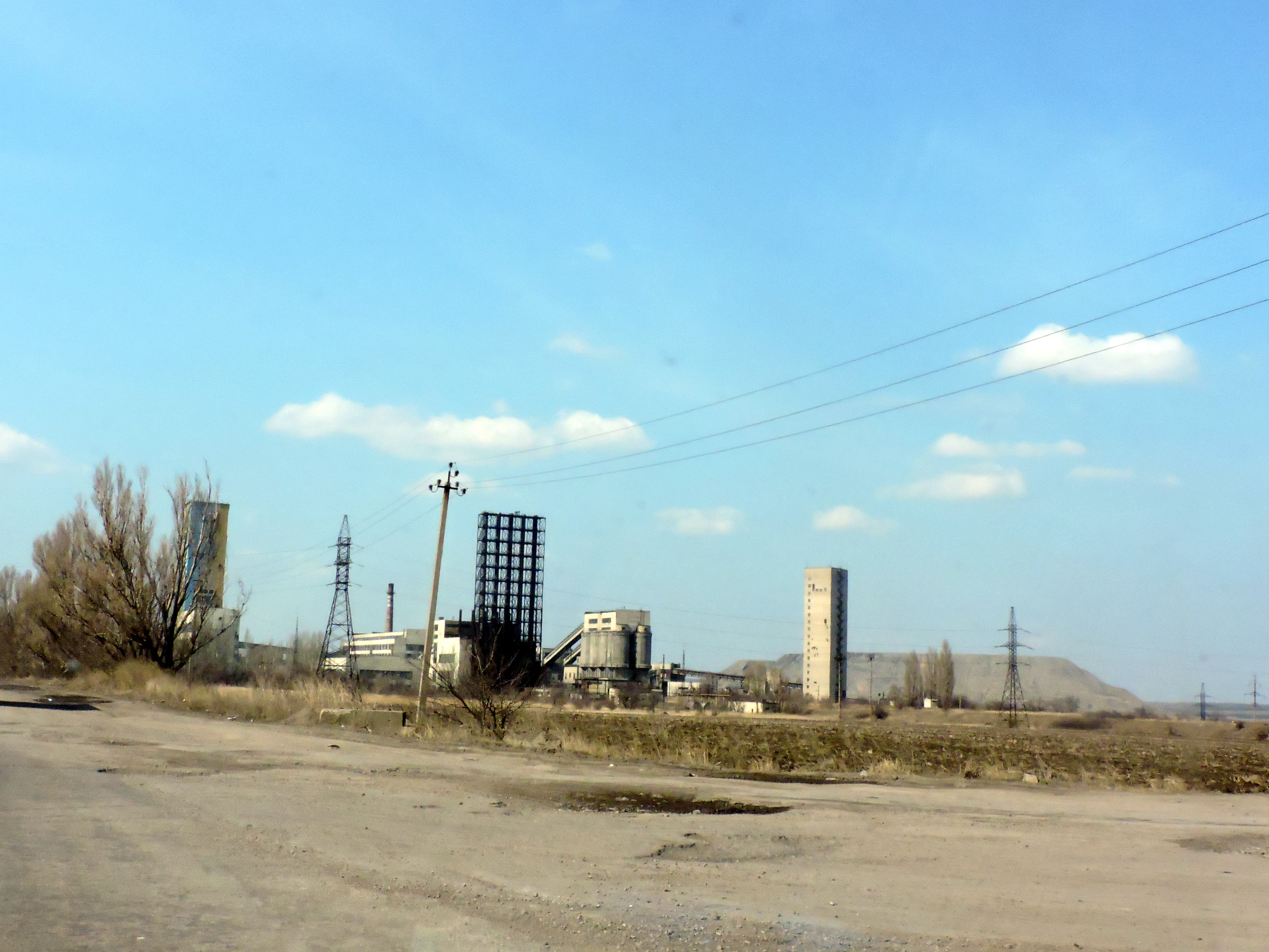 Вид на Шахту «імені О.Г. Стаханова». Східна частина шахти та терикон.